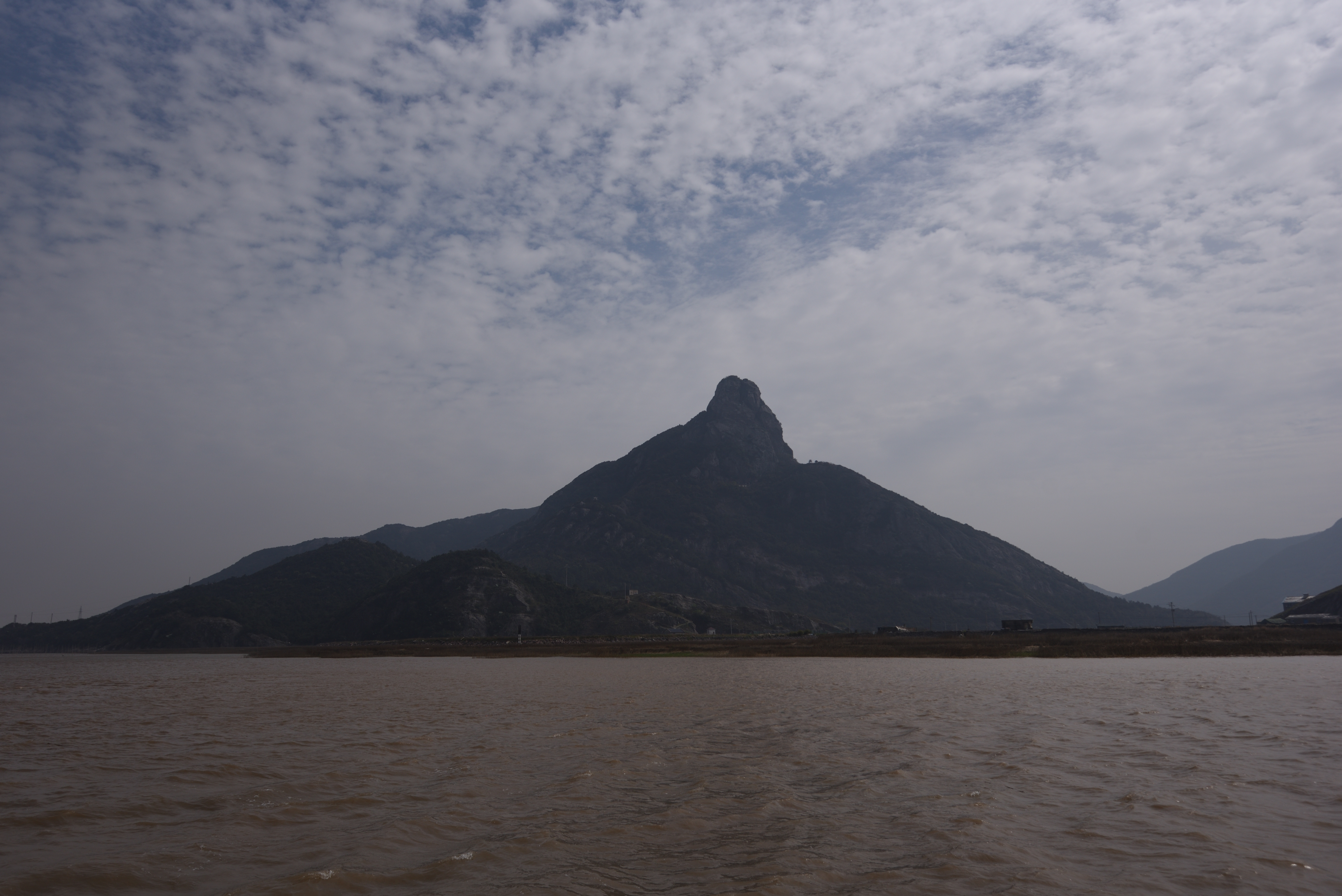 象山花岙岛